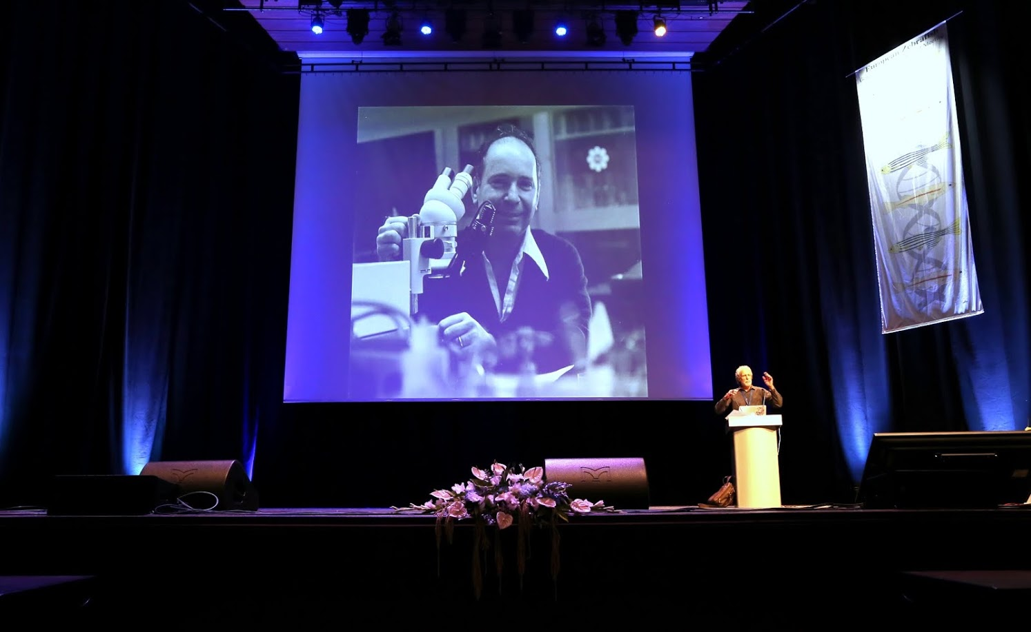 Monte Westerfield-George Streisinger 10th European ZebraFish Meeting, Budapest, Hungary 3-7 July 2017.